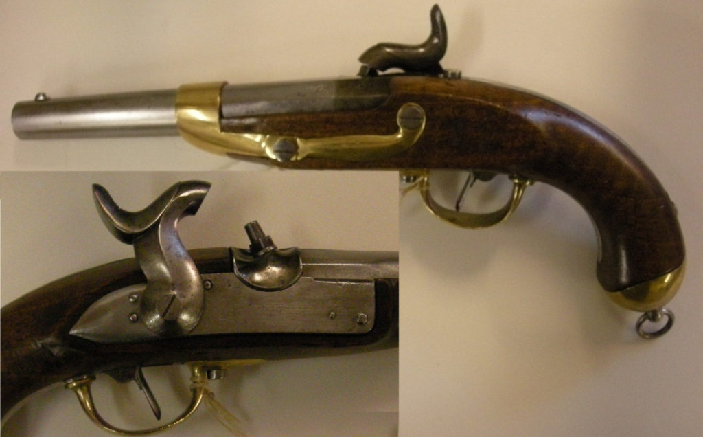 Perkussionspistole Ord. 1842 Kaliber 17,1 mm, franz. Fabrikat